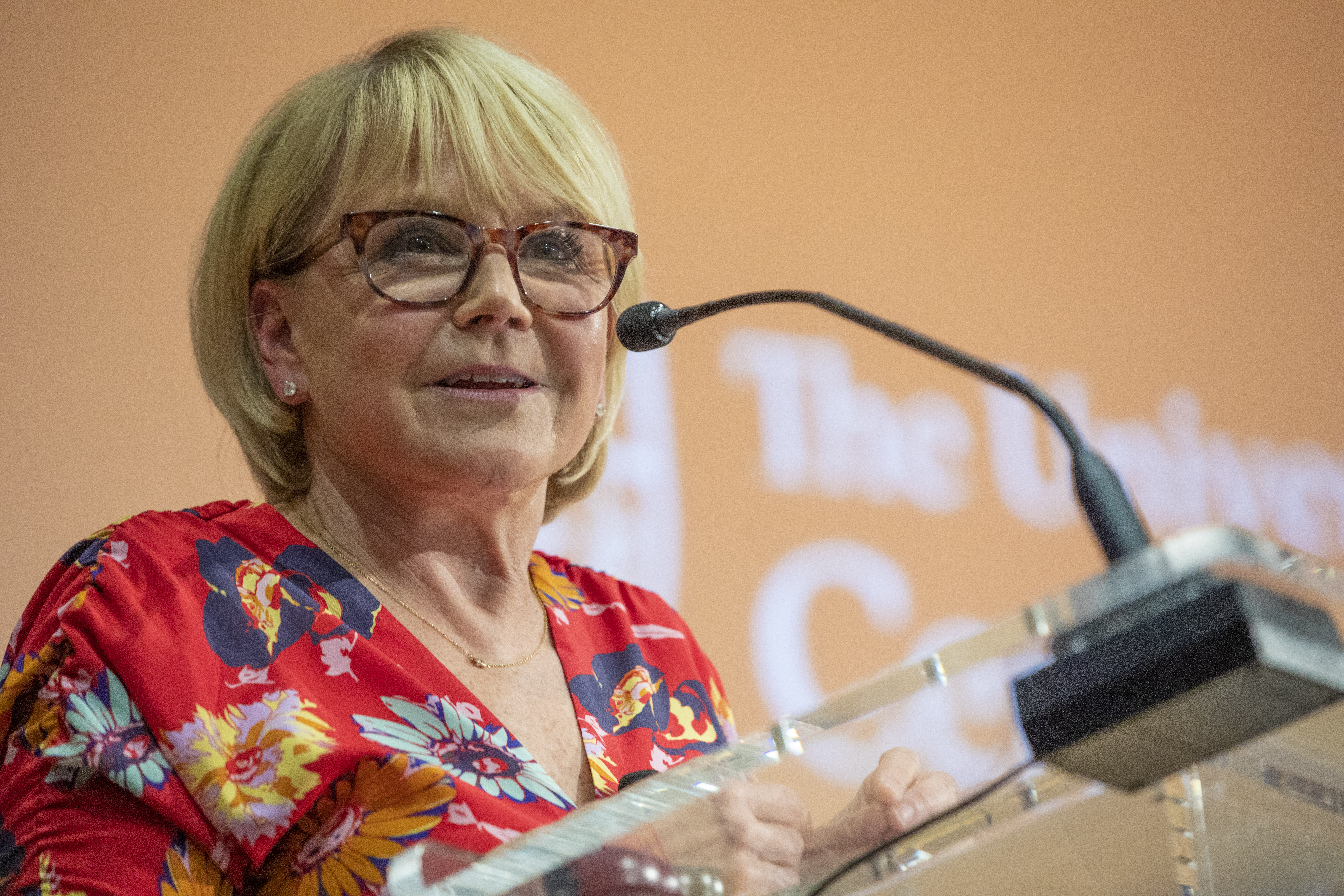 482A4776